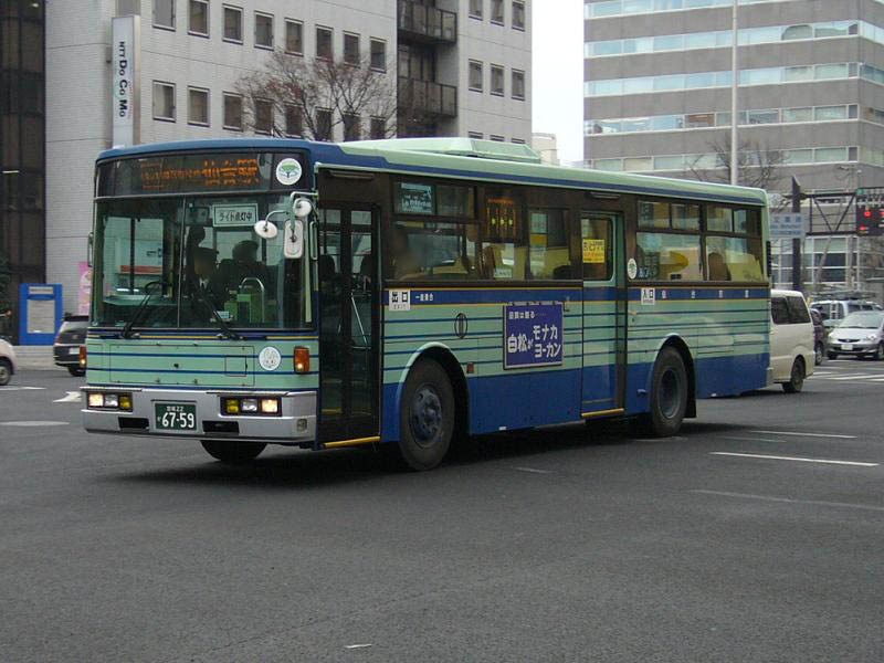 登録番号：宮城22か67-59 仙台市交通局所属 日産ディーゼル・スペースランナー KC-UA460LAN